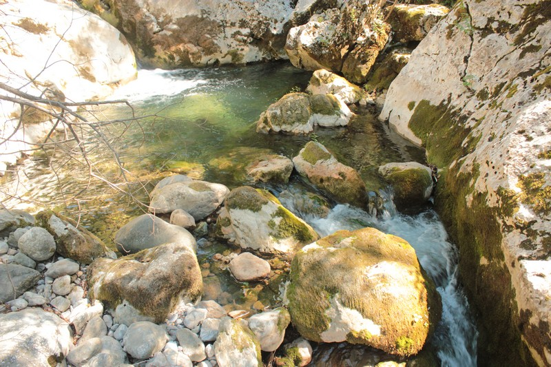 Специјални резерват природе Клисура реке Трешњице